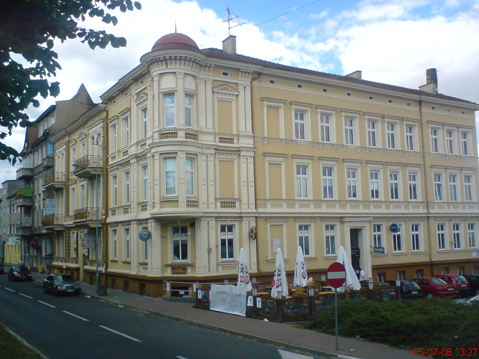 Kamienica z końca XIX wieku przy ulicy 1 Maja 6 w Słubicach.